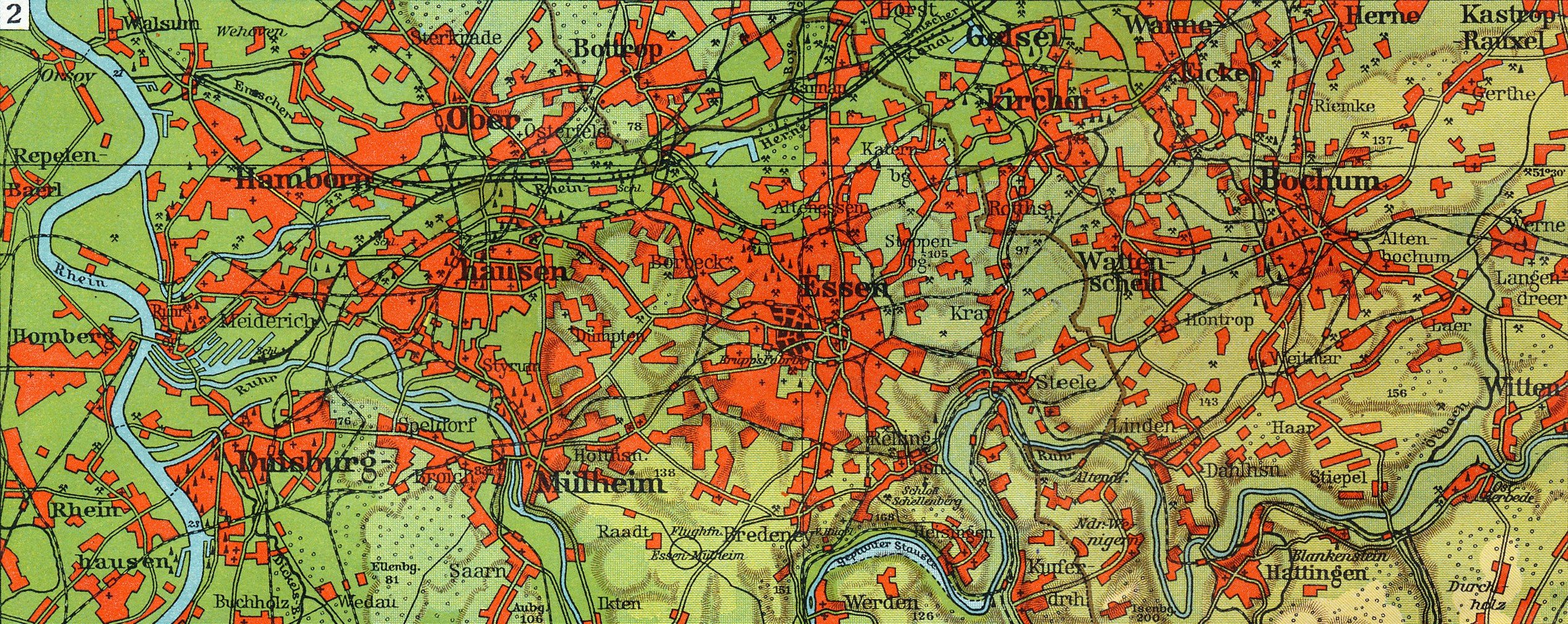 Deutsche Landschaft und Mensch, Das Rheinisch-westfälische Industriegebiet 1930 This is a part of an old atlas. It does not represent the current situation.